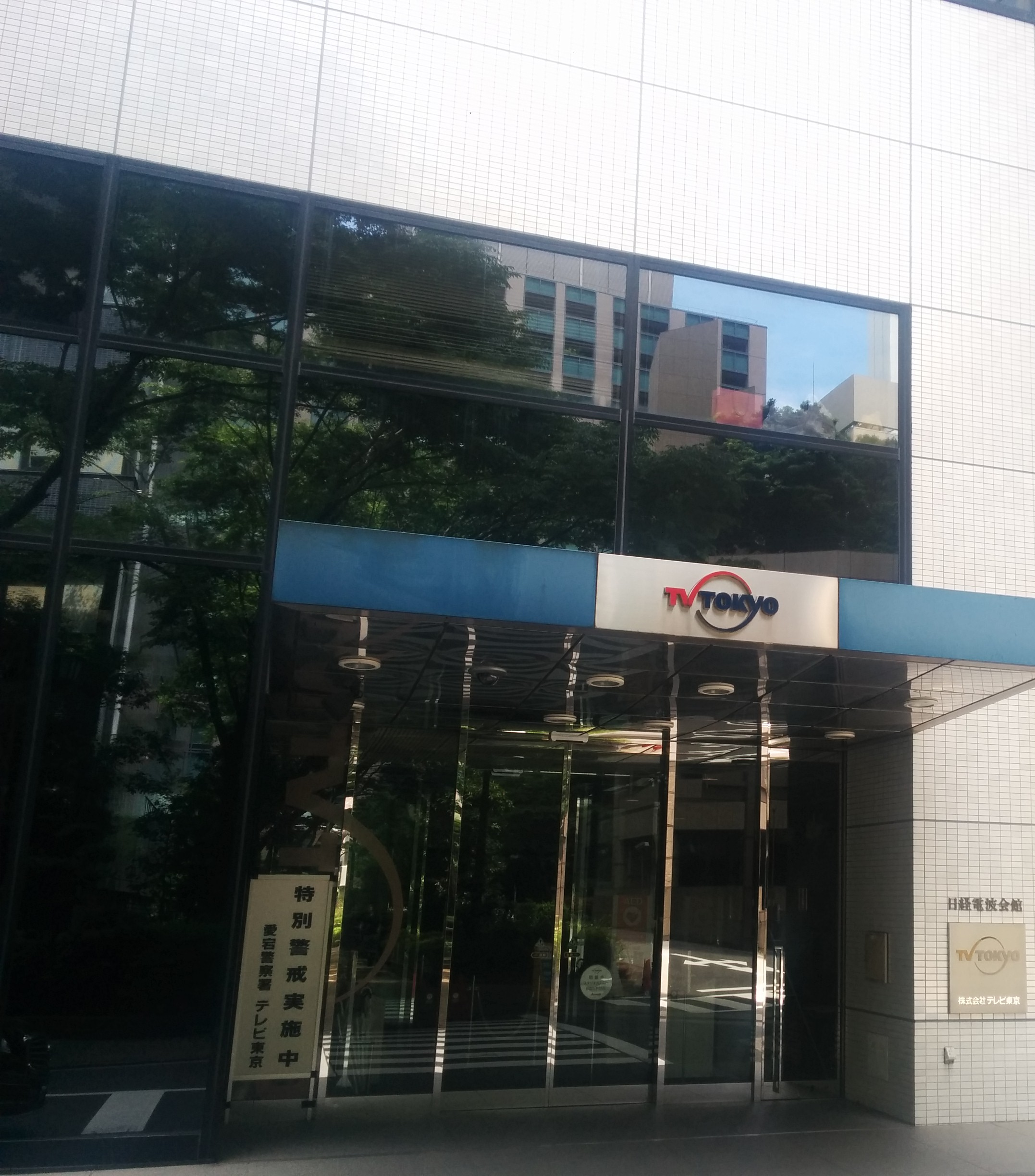 テレビ東京旧社屋（東京都虎ノ門）入口。